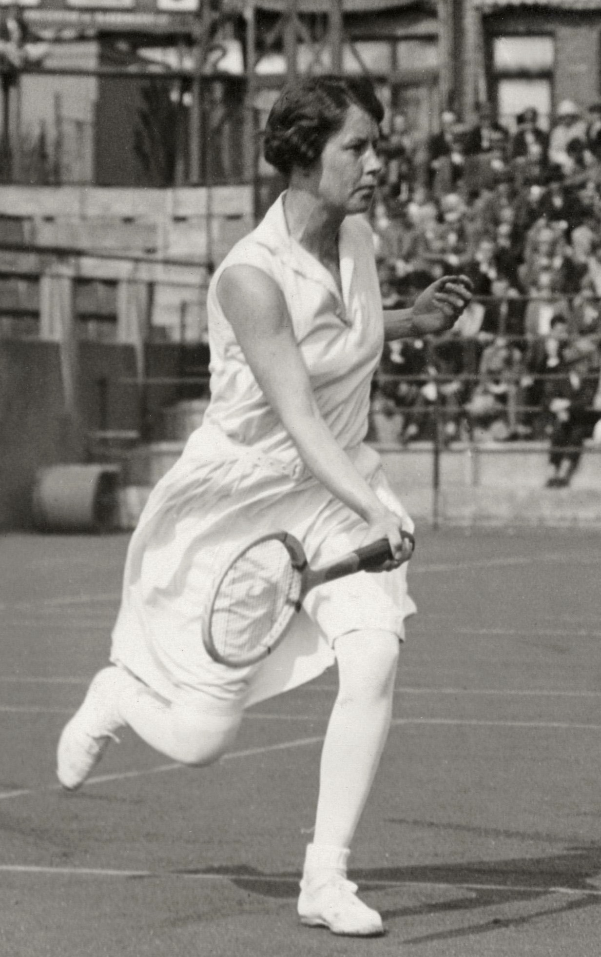 Sport, tennis. Tennisster M.J (Mence) Canters in actie op tennistoernooi, tijdens de wedstrijd Nederland-USA. Nederland, Scheveningen, 1928.